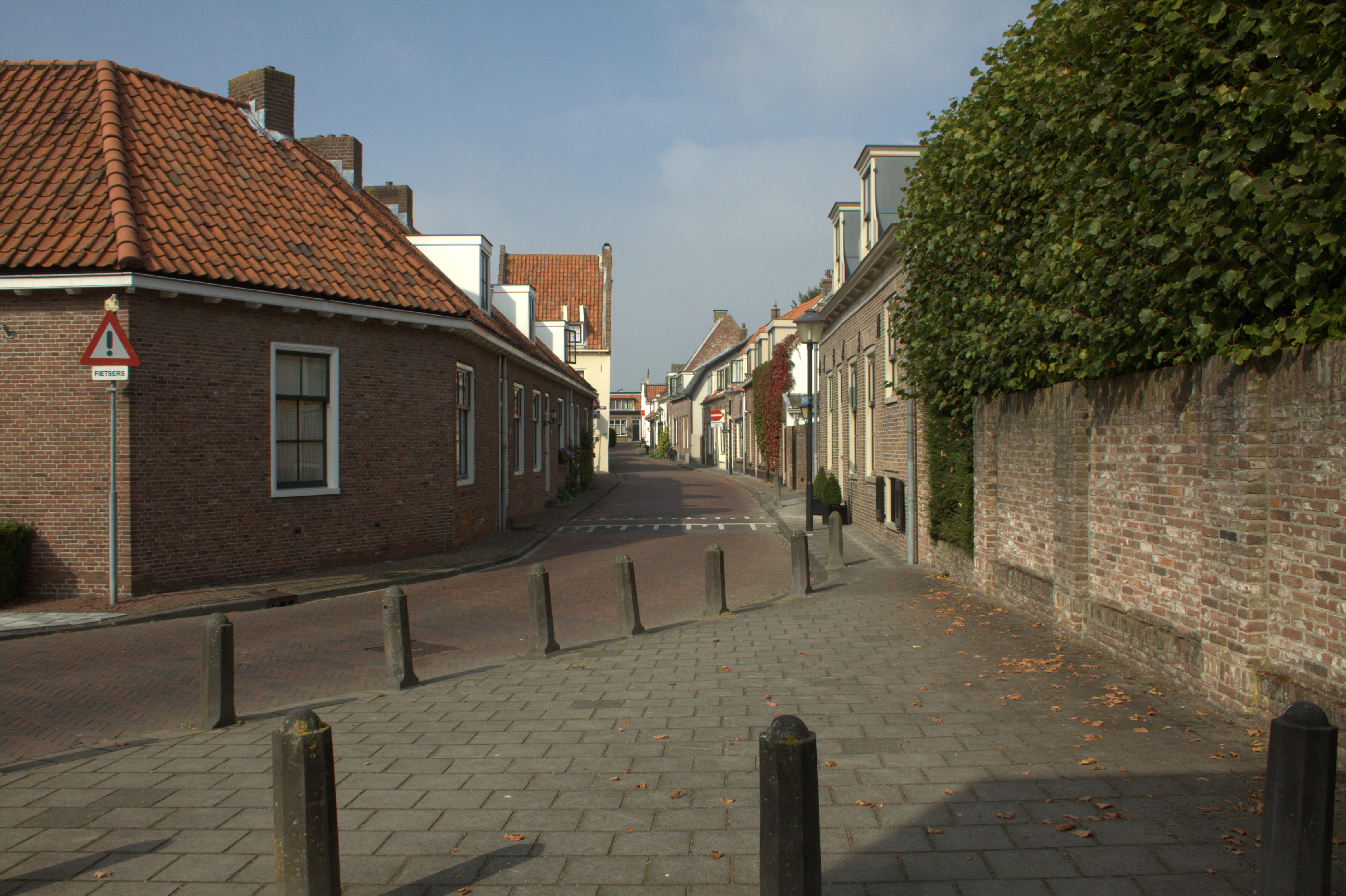 Vanuit de Weesdijk kijken we de Varkensmarkt in.